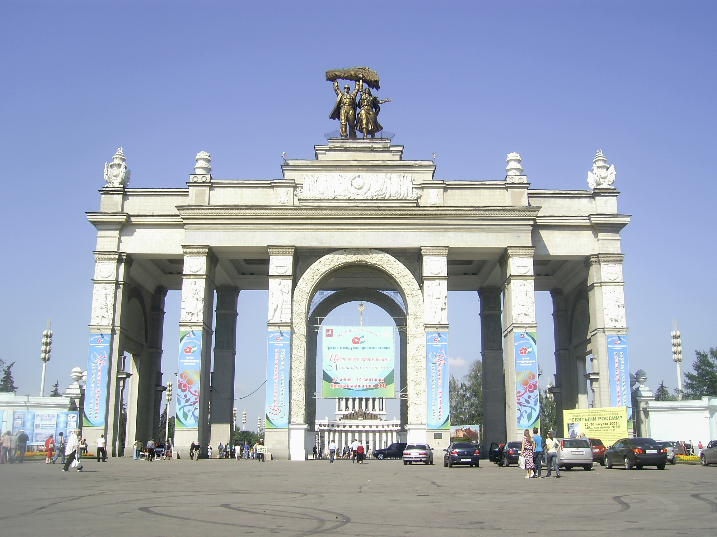 Главный вход ВСХВ 1954 года